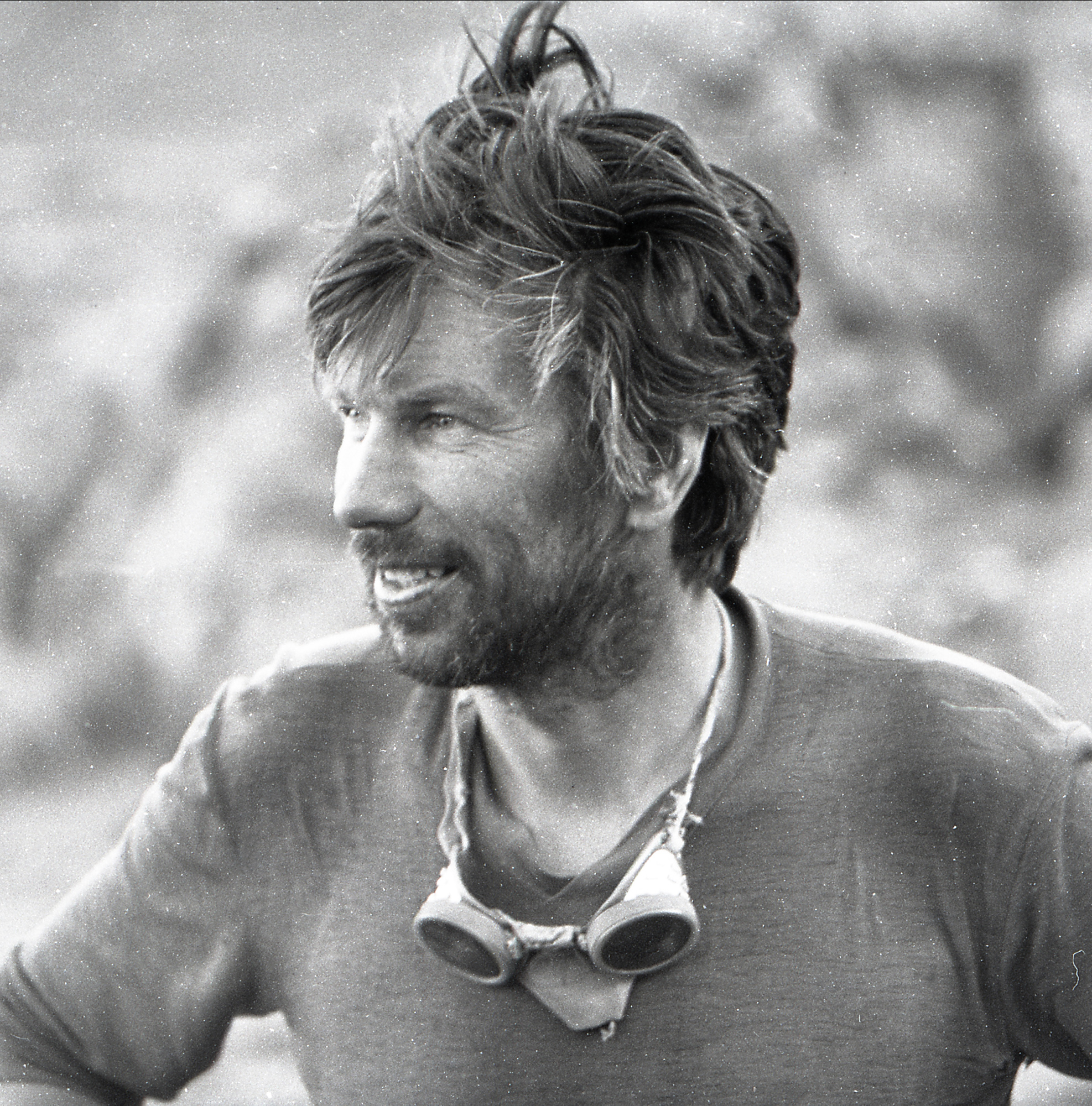 Lembit Hiiesalu